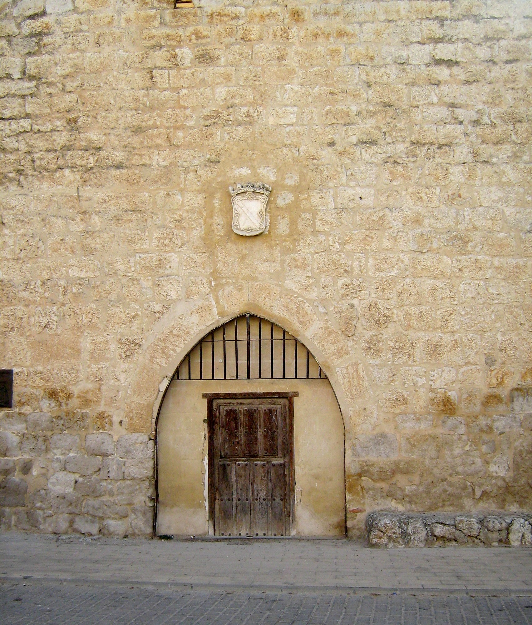 Curiel de Duero. Palacio de los Zúñiga. Puerta principal. Valle del Cuco. Valladolid